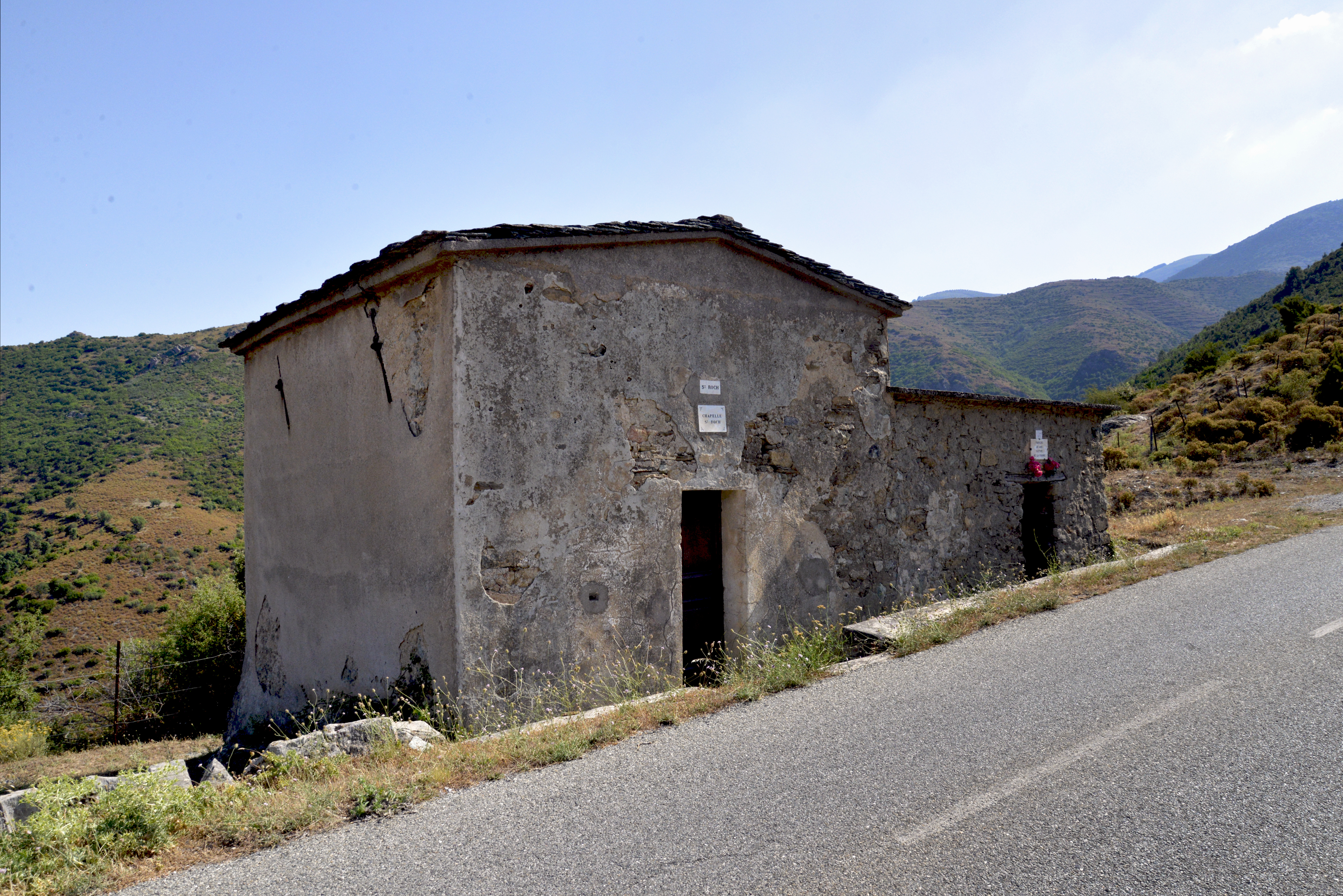 Tralonca, Centre Corse (Haute-Corse) - Chapelle rupestre Saint-Roch située à 640 m d'altitude en bordure de la route D41, à un petit col entre le village et la Punta Tucoli.